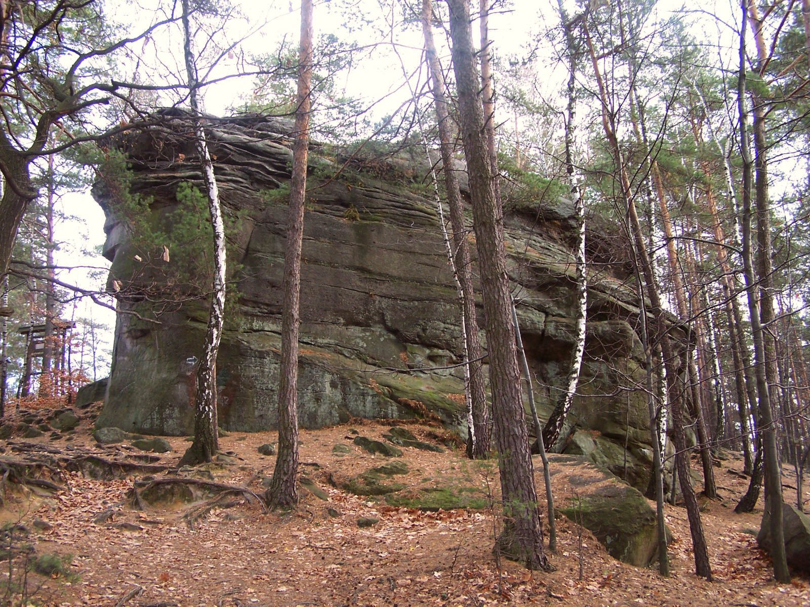 Kamienie Brodzińskiego (Paprotna, Pogórze Wiśnickie)